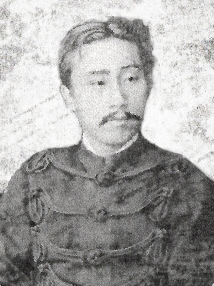 北畠通城の肖像写真。